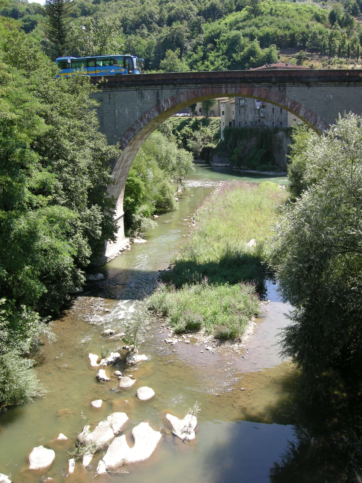 Castelnuovo garfagnana, serchio